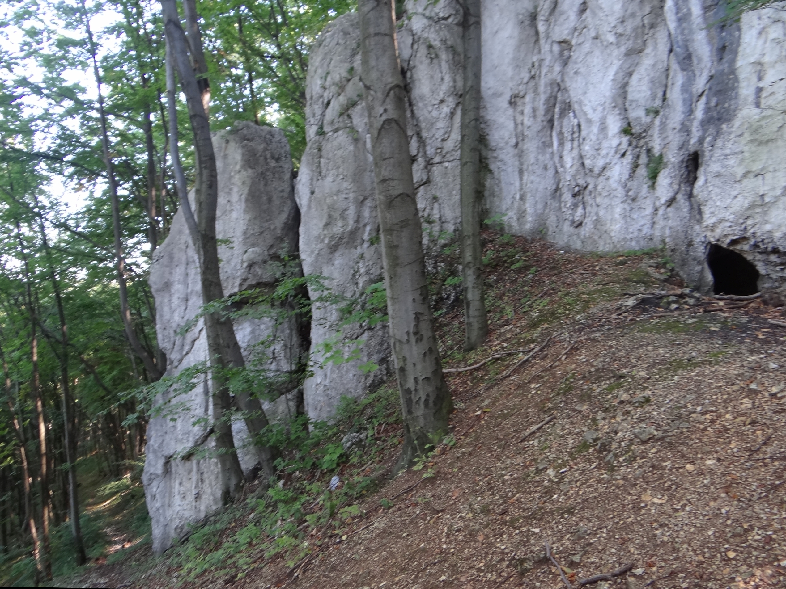 Skała nad Źródłem w Dolinie Będkowickiej